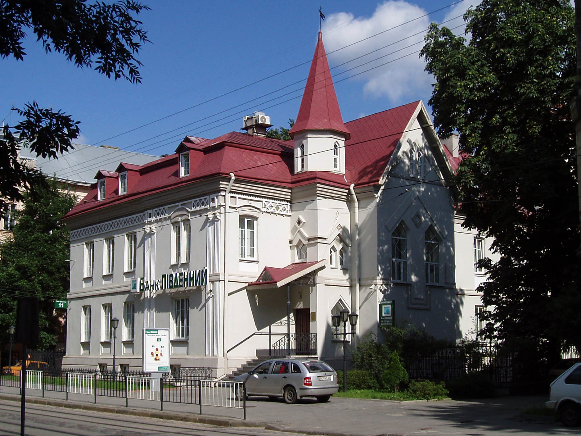 Будинок № 11 на вулиці Чупринки у Львові.